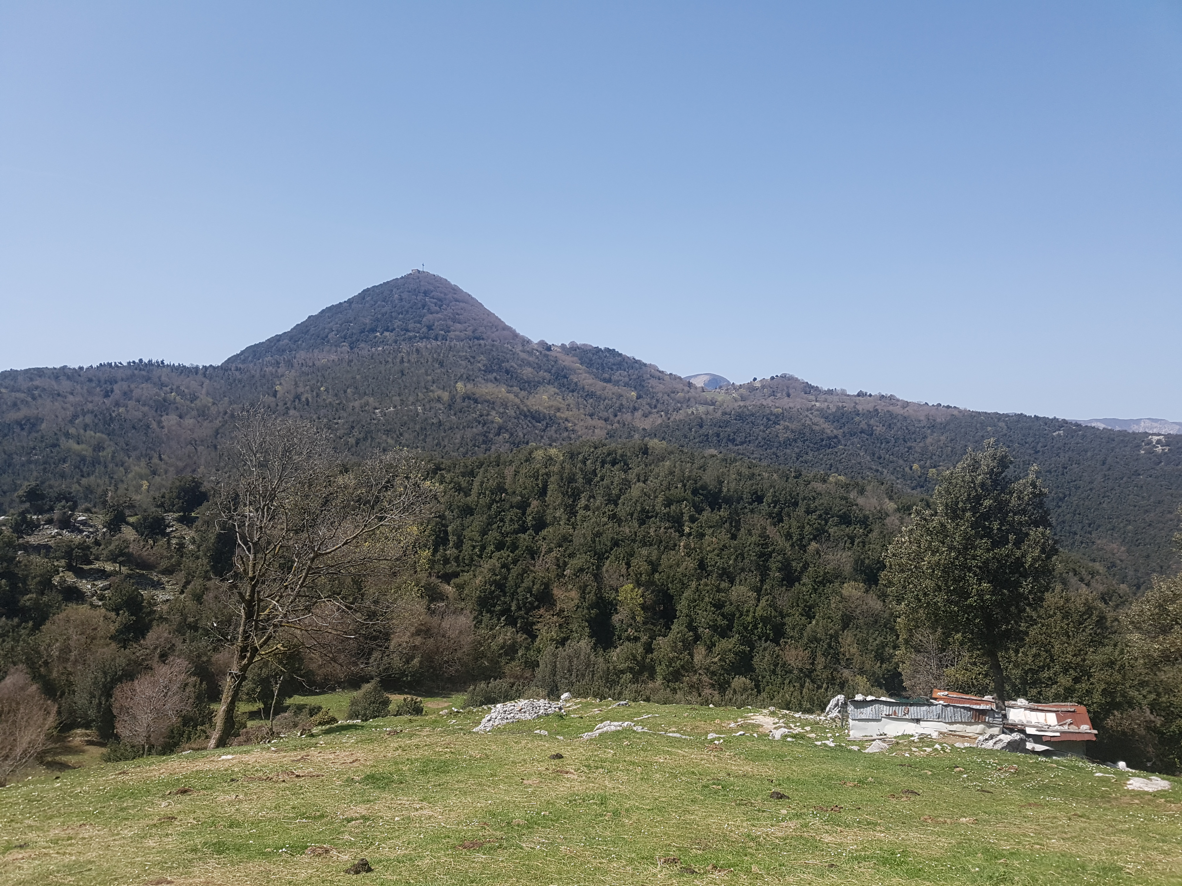 Vista del Monte Caccume (1095 m), Klippe di calcare cretaceo sovrapposto tettonicamente alla serie dei Monti Lepini